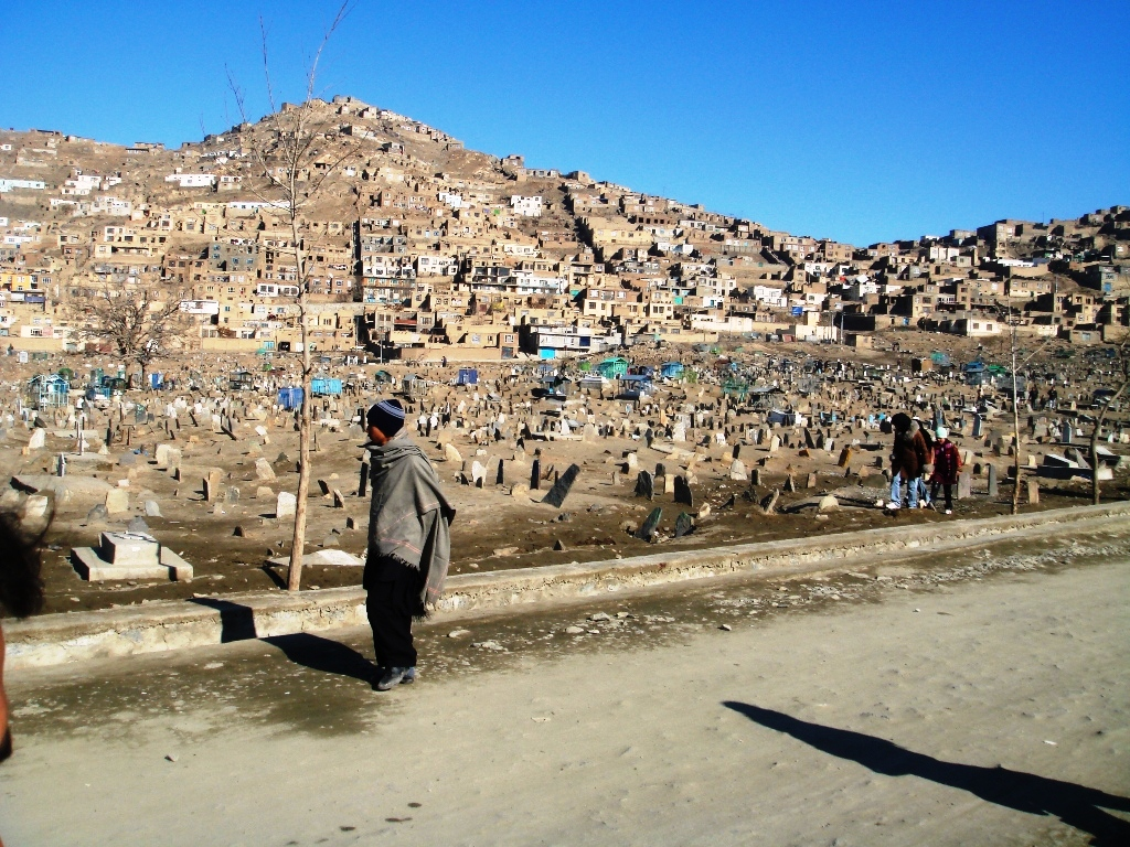 Kartie Sakhali old grave yard